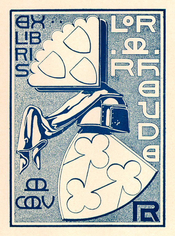 Ex Libris Lorenz M. Rheude, von ihm selbst gefertigt